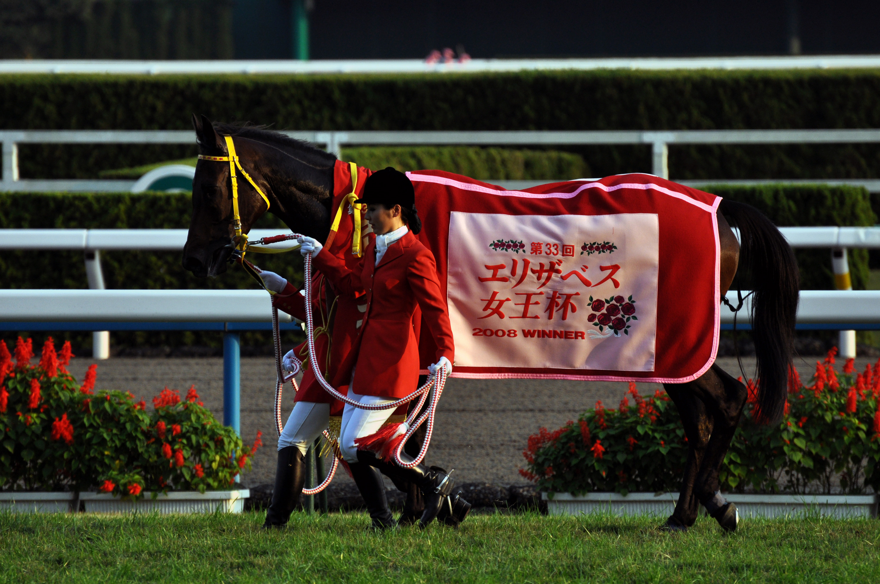 第33回エリザベス女王杯・リトルアマポーラ(Little Amapola)